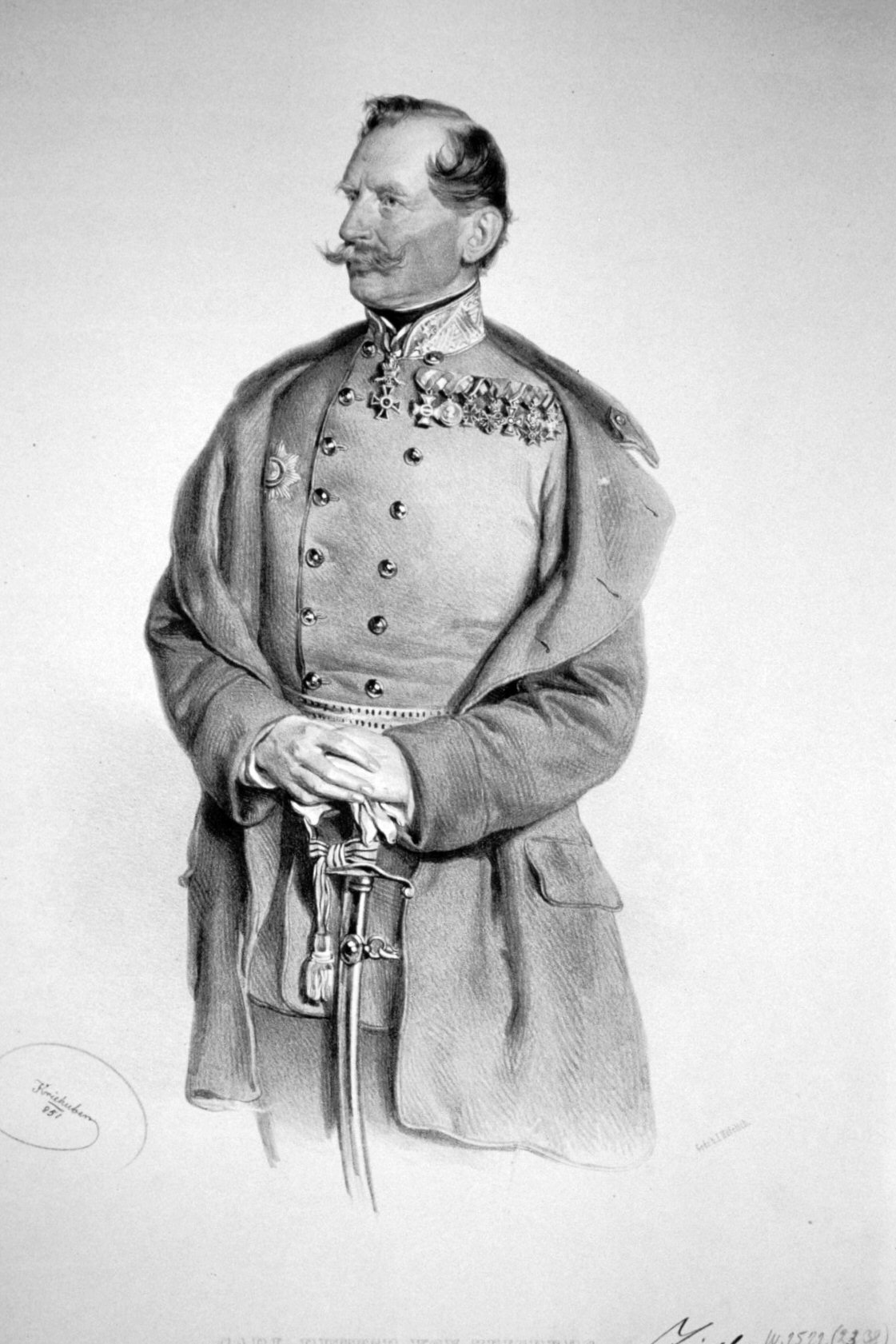 Karl von Zeisberg (1788-1863), Feldmarschallleutnant, Ritter des Maria-Theresien-Ordens und des Leopoldordens.